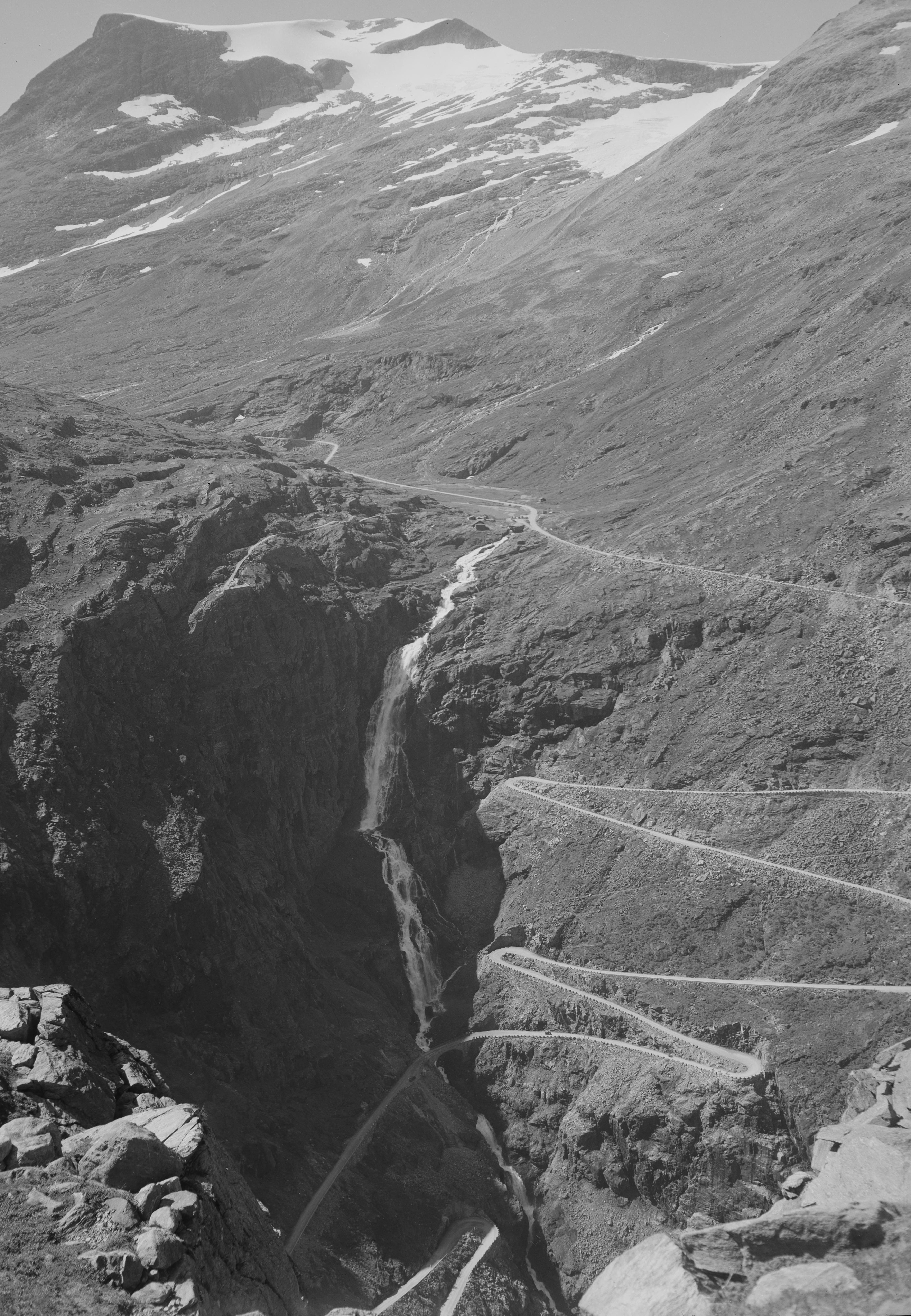 Bildet er hentet fra Nasjonalbibliotekets bildesamling. Anmerkninger til bildet var: Fotograf : ukjent Trollstigen, Rauma, Møre og Romsdal